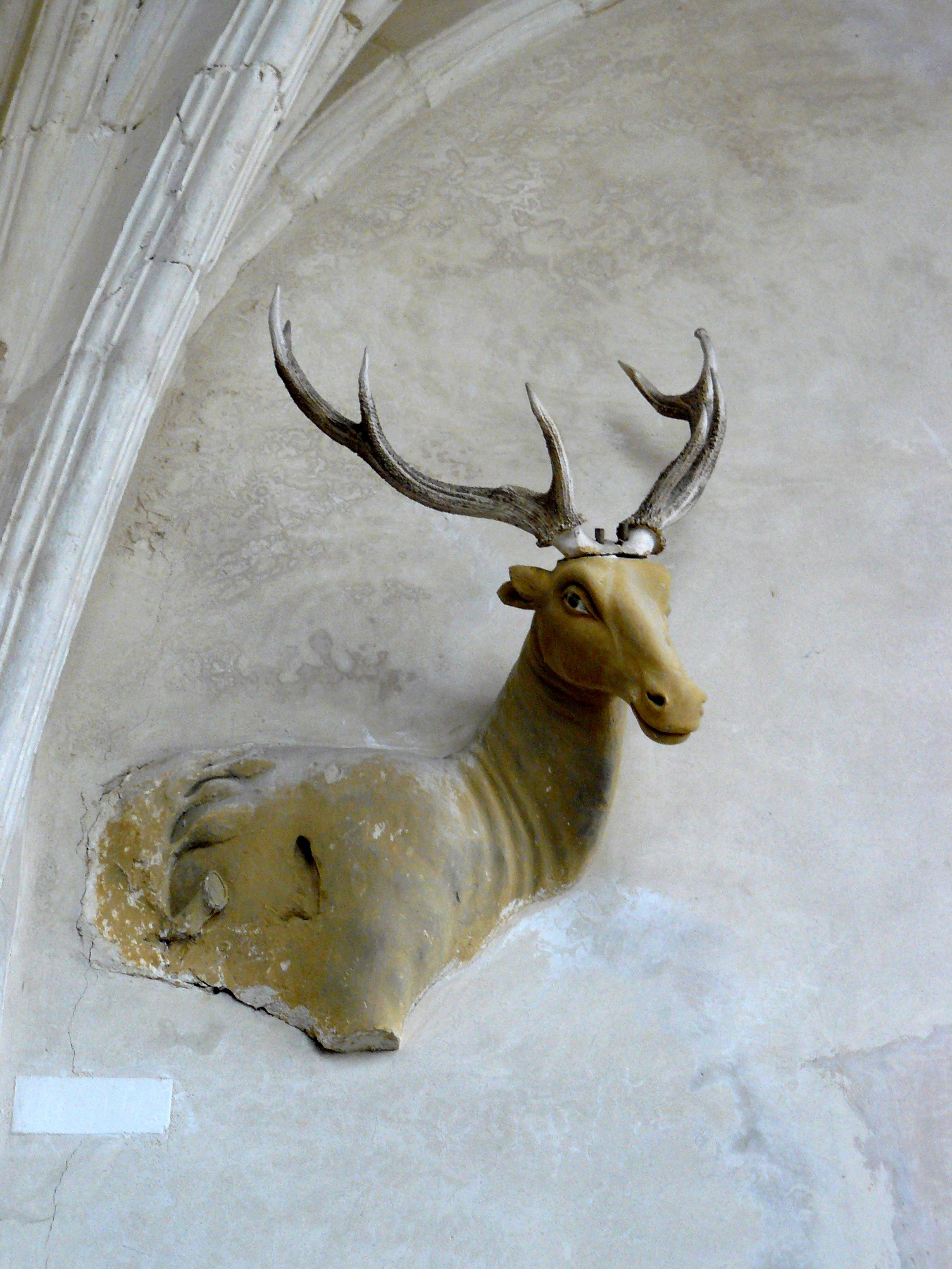 Cerf émergeant du mur de l'église de Vignory (Haute-Marne, France)